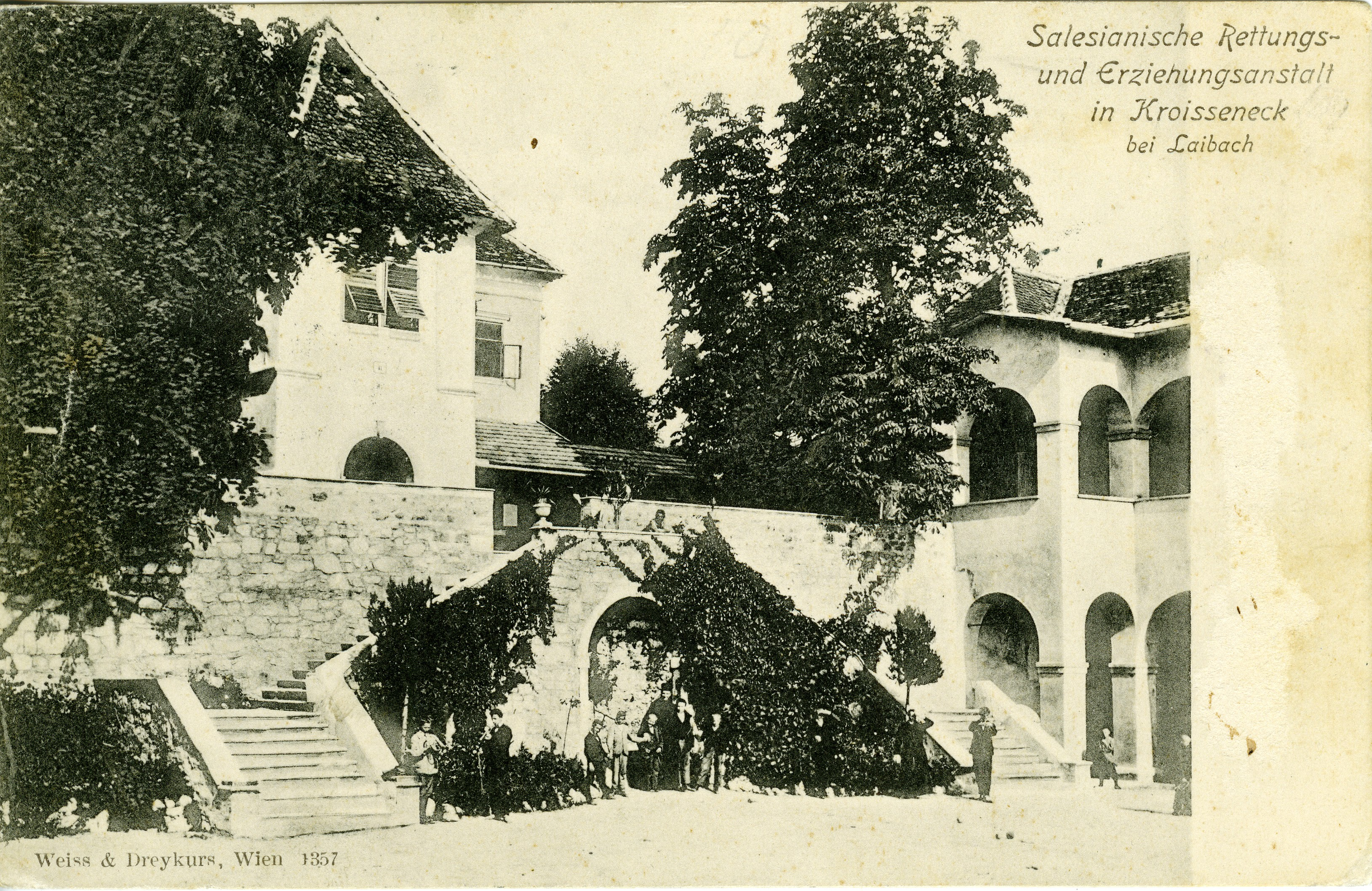 Dvorec Rakovnik.